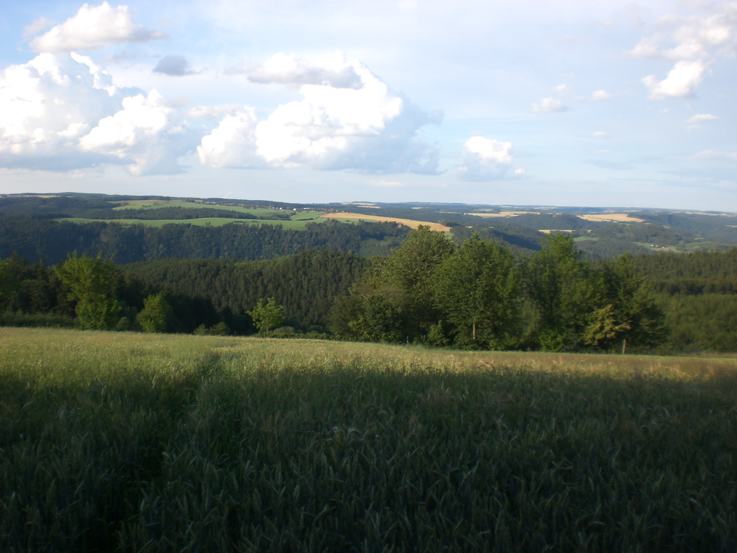 Die typisch Thüringische Landschaft bei Drognitz